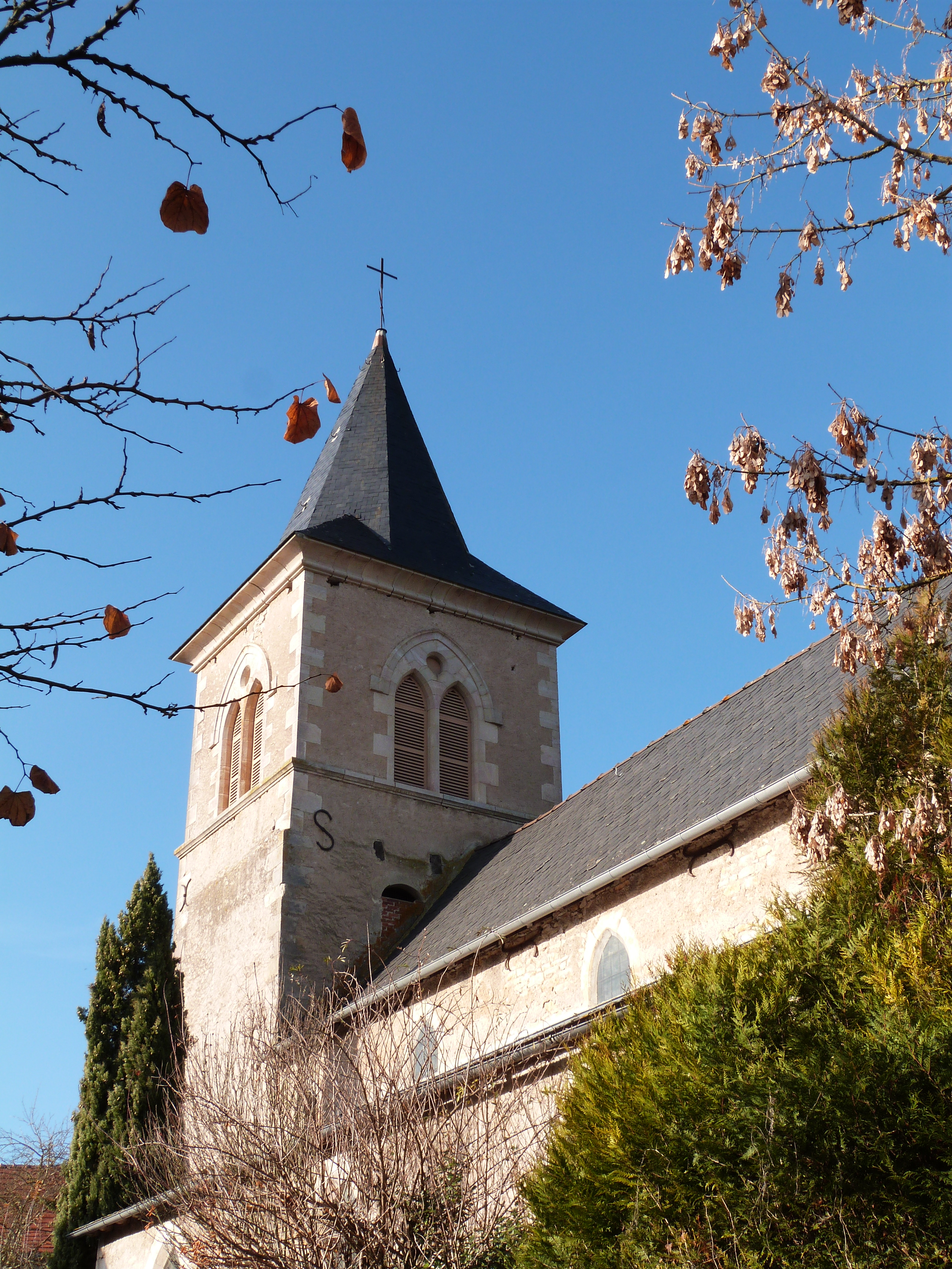 Clocher de l'église Notre-Dame de la Nativité dans le village de Salles-Courbatiès